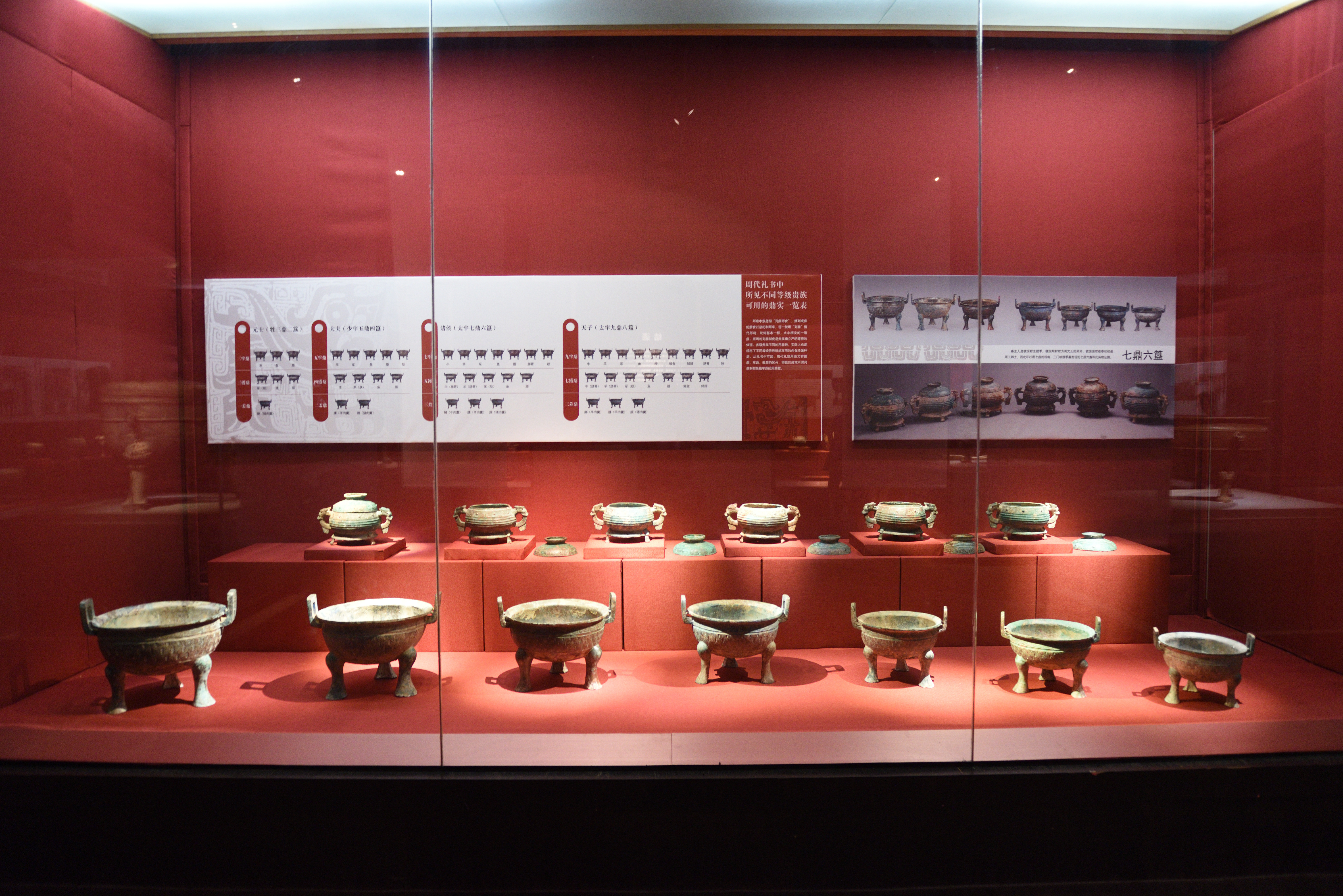 虢季墓七鼎六簋，2016年杭州良渚博物院“鼎盛中华”特展展出